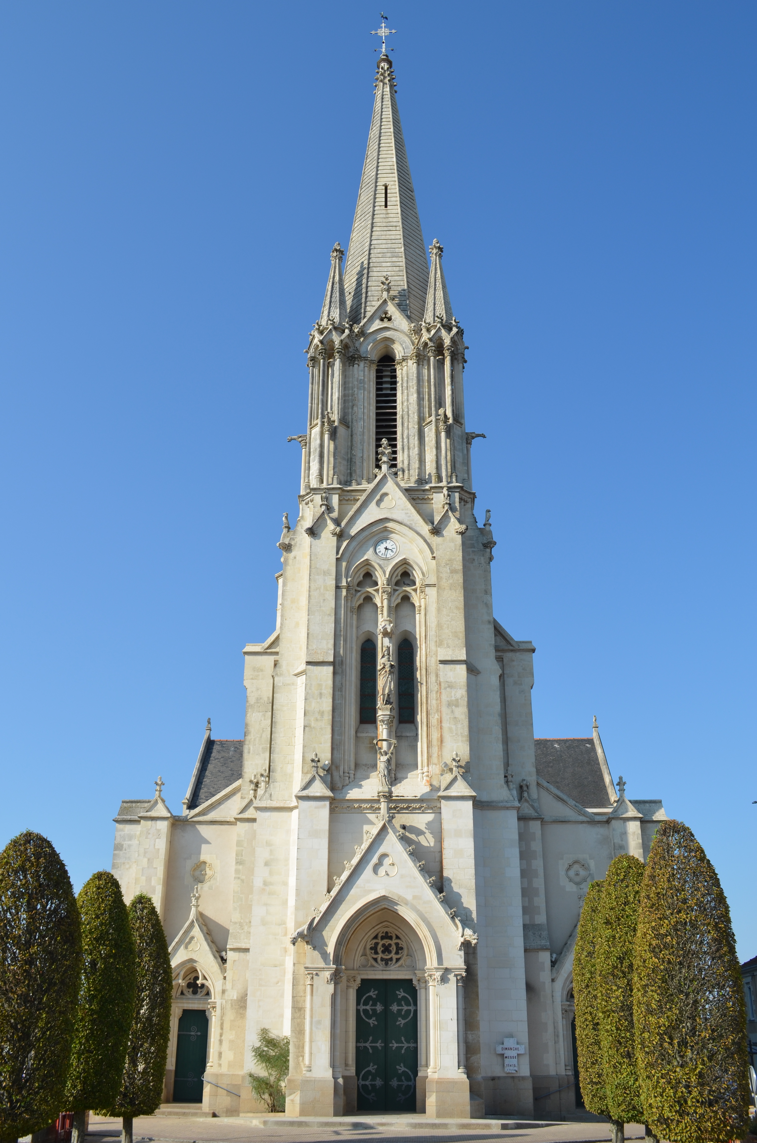 Eglise Notre-Dame de l'Assomption - La Chapelle-Basse-Mer (Loire-Atlantique)